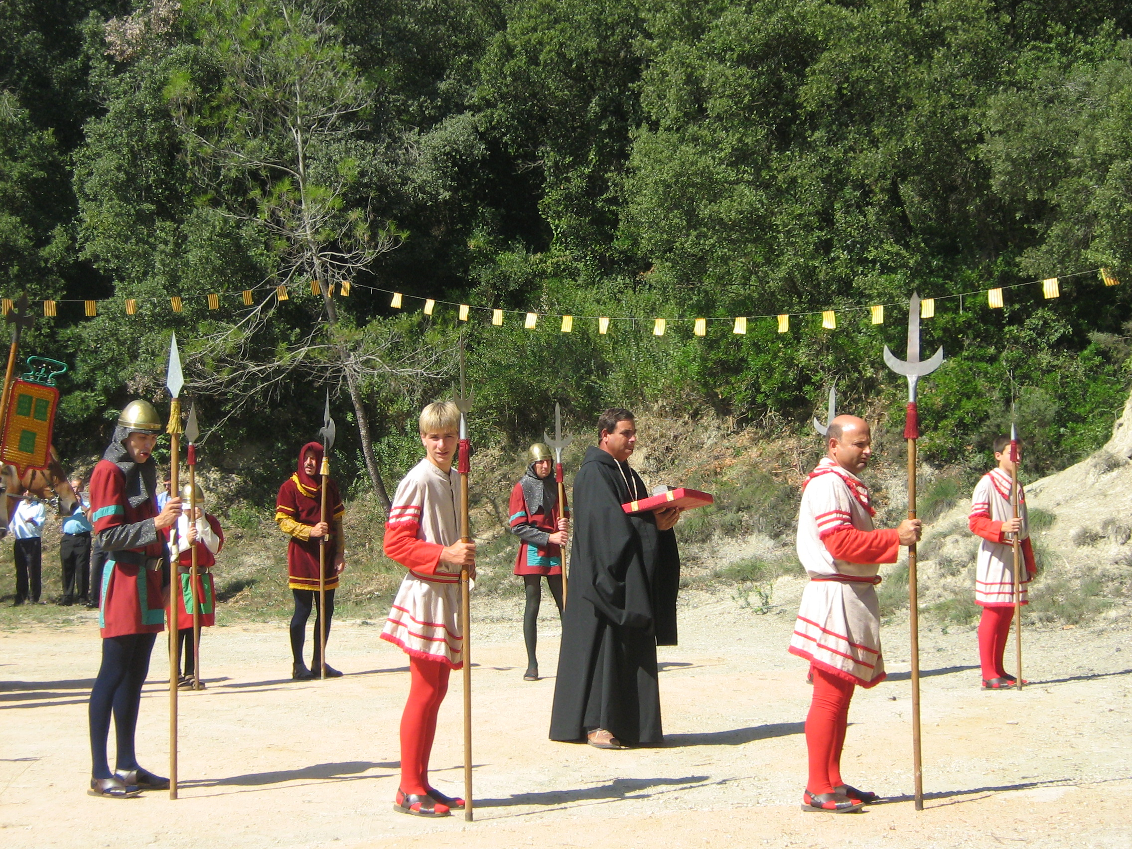 Escena de la cavalgada històrica de l'Aplec de Sant Ferriol. S'hi veu un frare que ofereix les reliquies del sant al rector del poble.